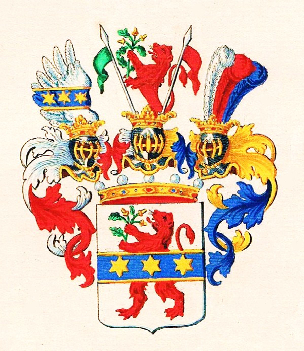 Wappen der Freiherren Cerrini de Monte Varchi, original altkolorierter Wappen-Kupferstich im Fürstenkolorit